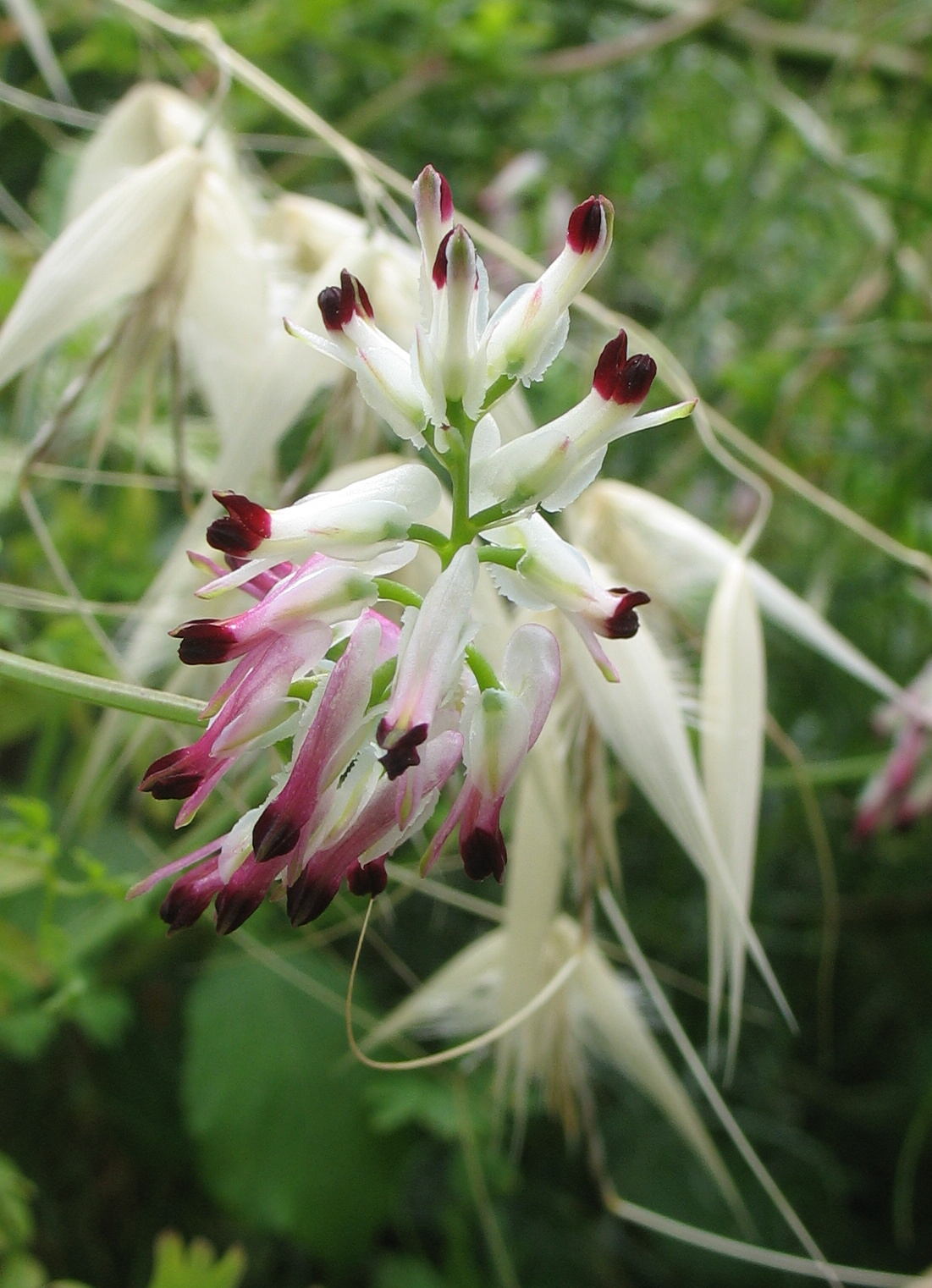 Fumaria capreolata. Moinhos da Rocha (Freguesia de Santo Estevão, Tavira, Algarve, Portugal)